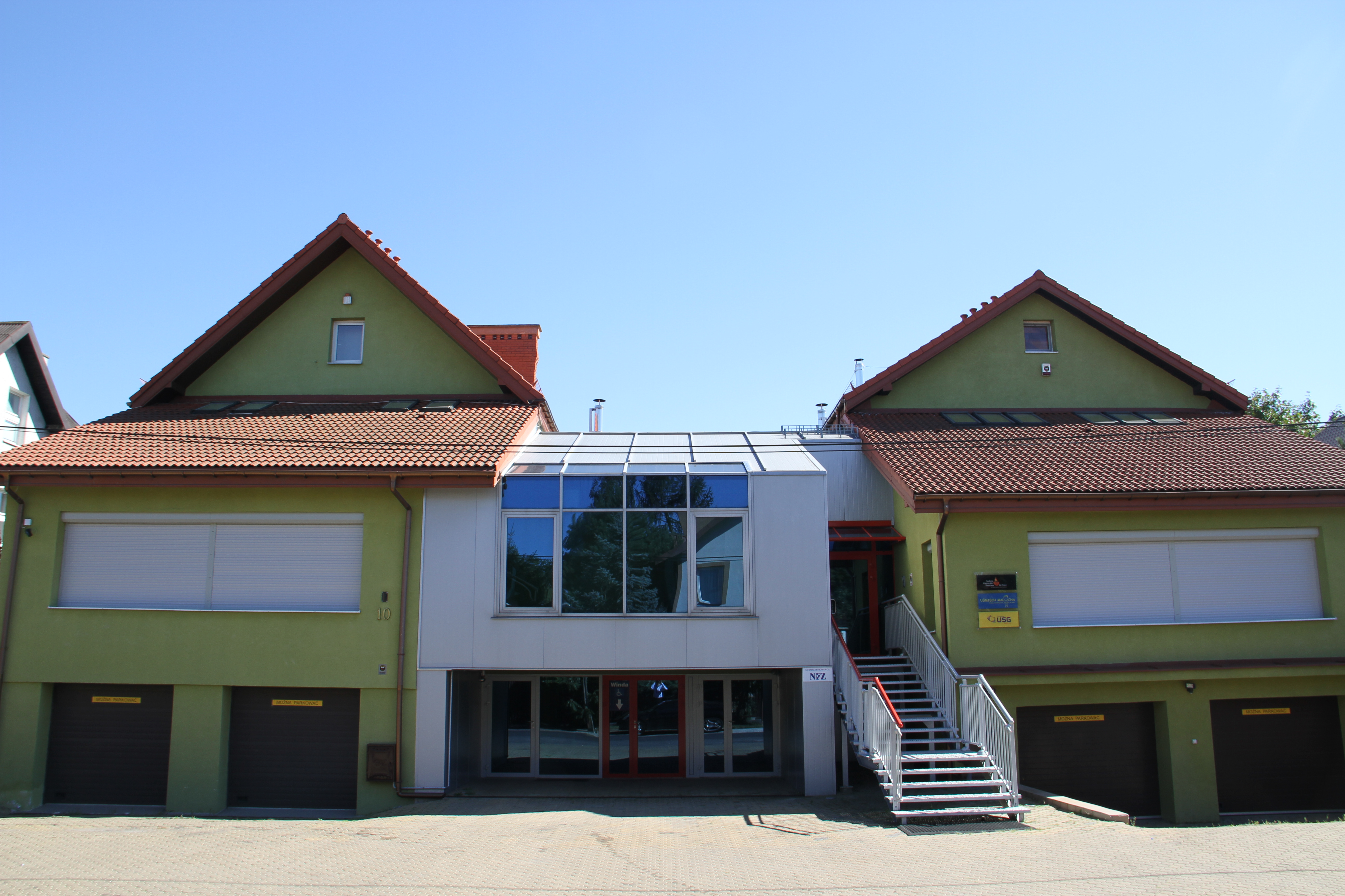 Siedziba Fundacji Warszawskie Hospicjum dla Dzieci - 2010